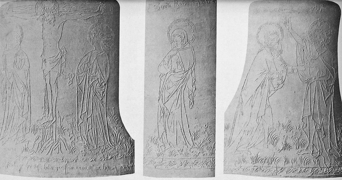 Die Ritzzeichnungen von Nikolaus Eisenberg auf der Glocke Gloriosa von 1477 in der Thomaskirche Leipzig. Links: Kreuzigungsgruppe mit Maria und Johannes, Mitte: Maria Magdalena mit dem Salbgefäß, Rechts: Der ungläubige Thomas. Die Höhe der Ritzzeichnungen beträgt 74 cm.